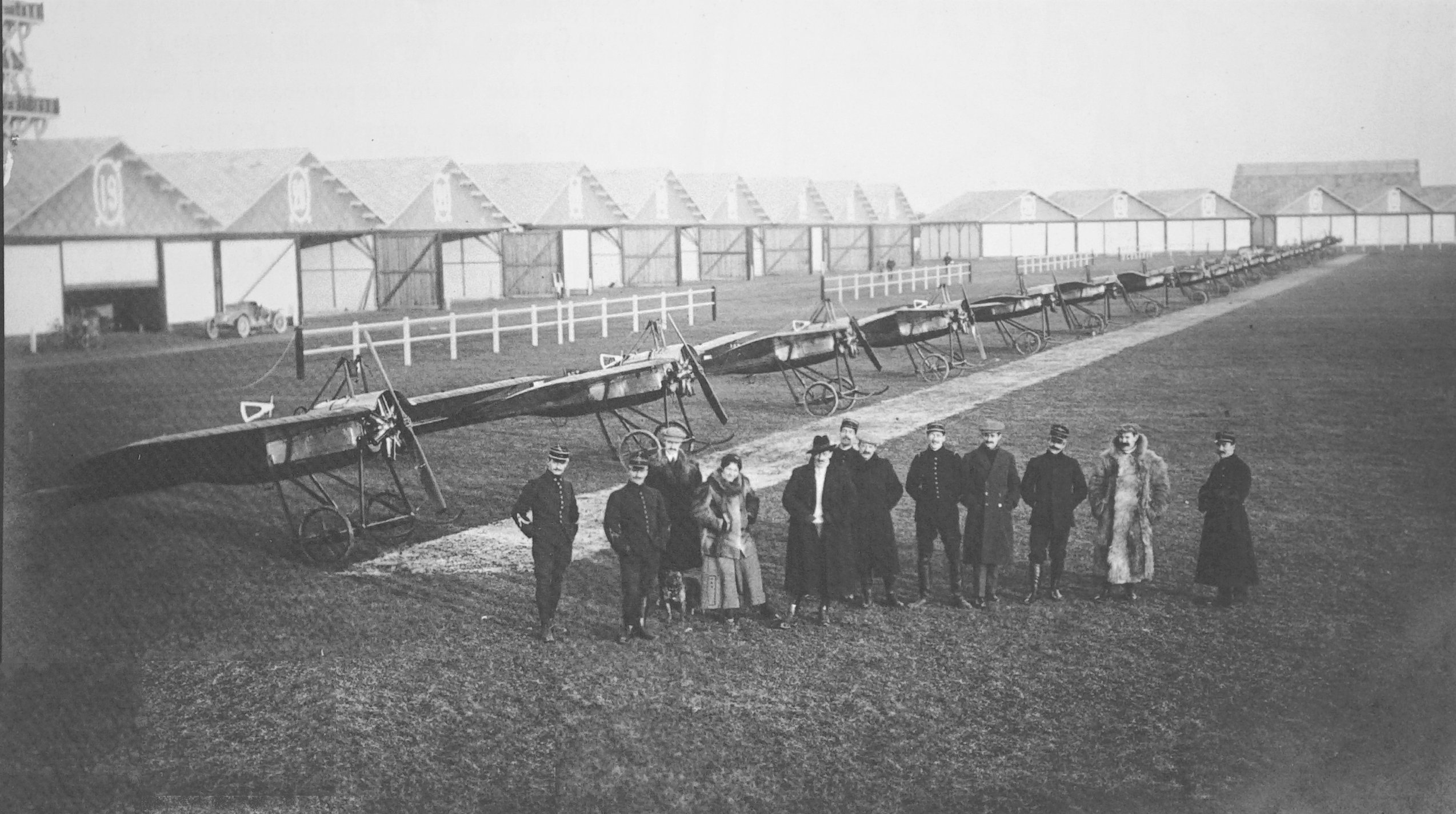 autour de l'aérodrome de Champagne.